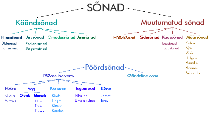 Eesti keele sõnaliikide skeem-diagramm